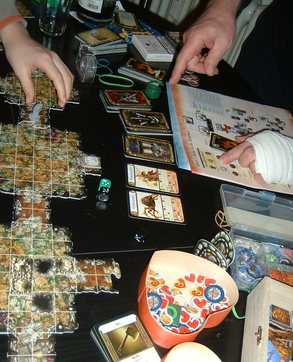 Situation aus dem Spiel: Die Reise ins Dunkel